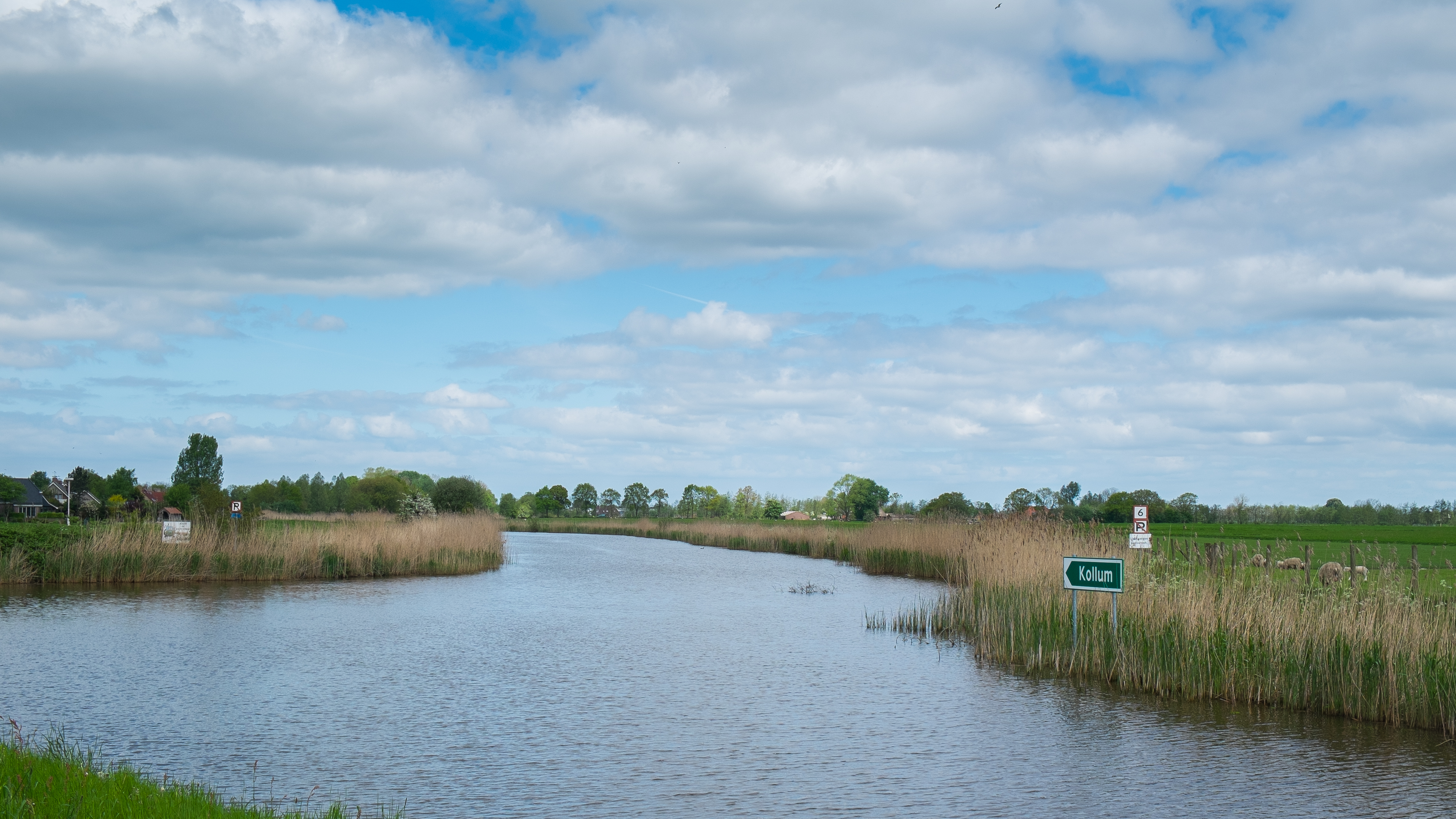 Ingang naar het Kollumerkanaal vanaf de Strobossertrekvaart